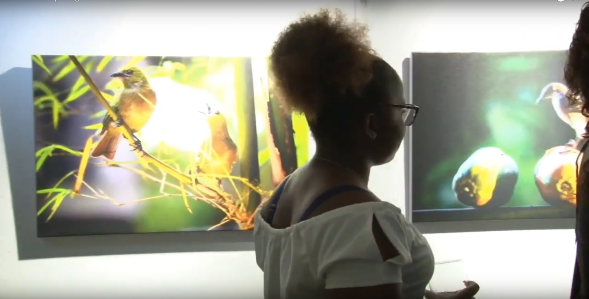 Nationale Kunstbeurs, Hotel Krasnapolsky